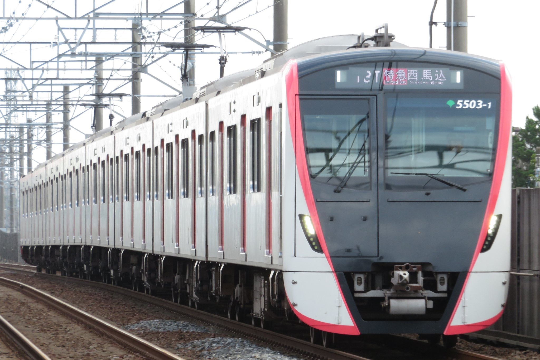 都営5500形5503F 特急 大町駅